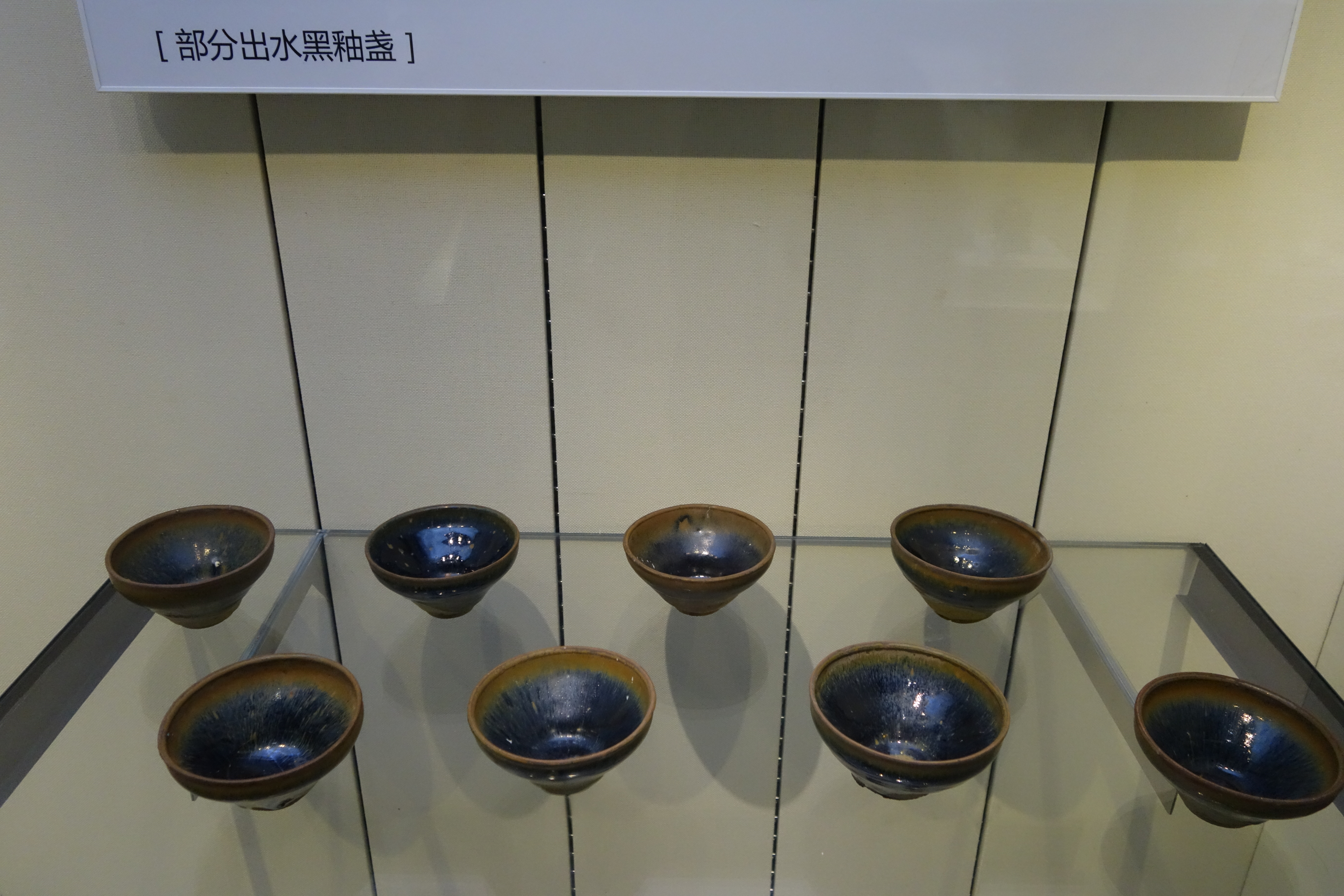 中国港口博物馆——“半洋礁一号”出水黑釉盏